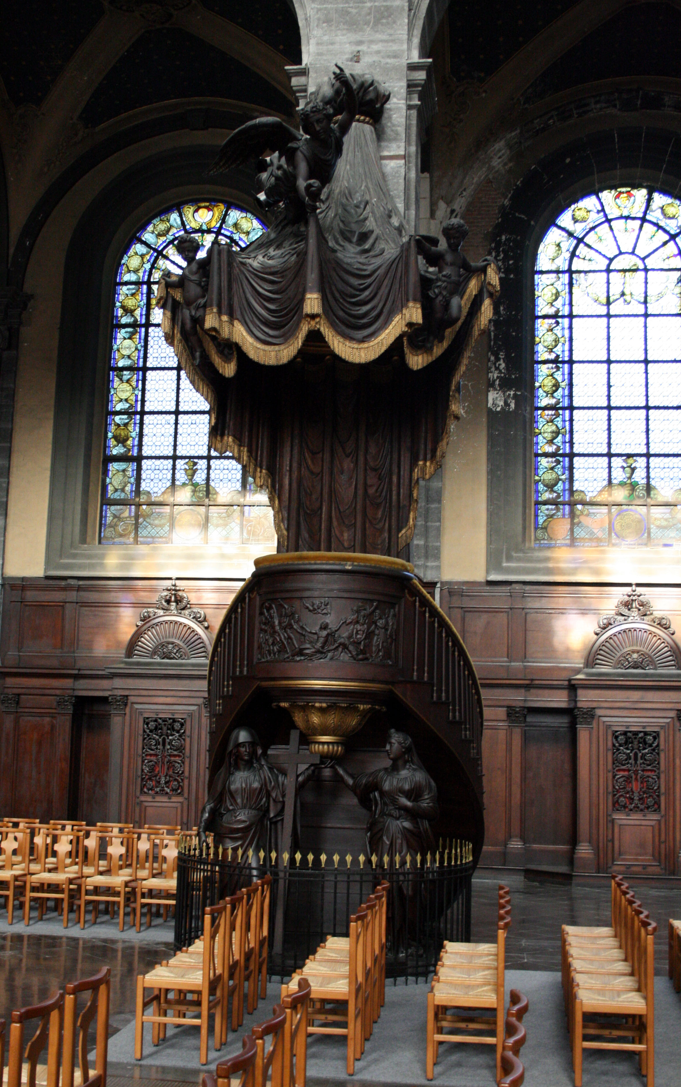 Chaire à prêcher dans l’église Saint-Étienne à Lille.